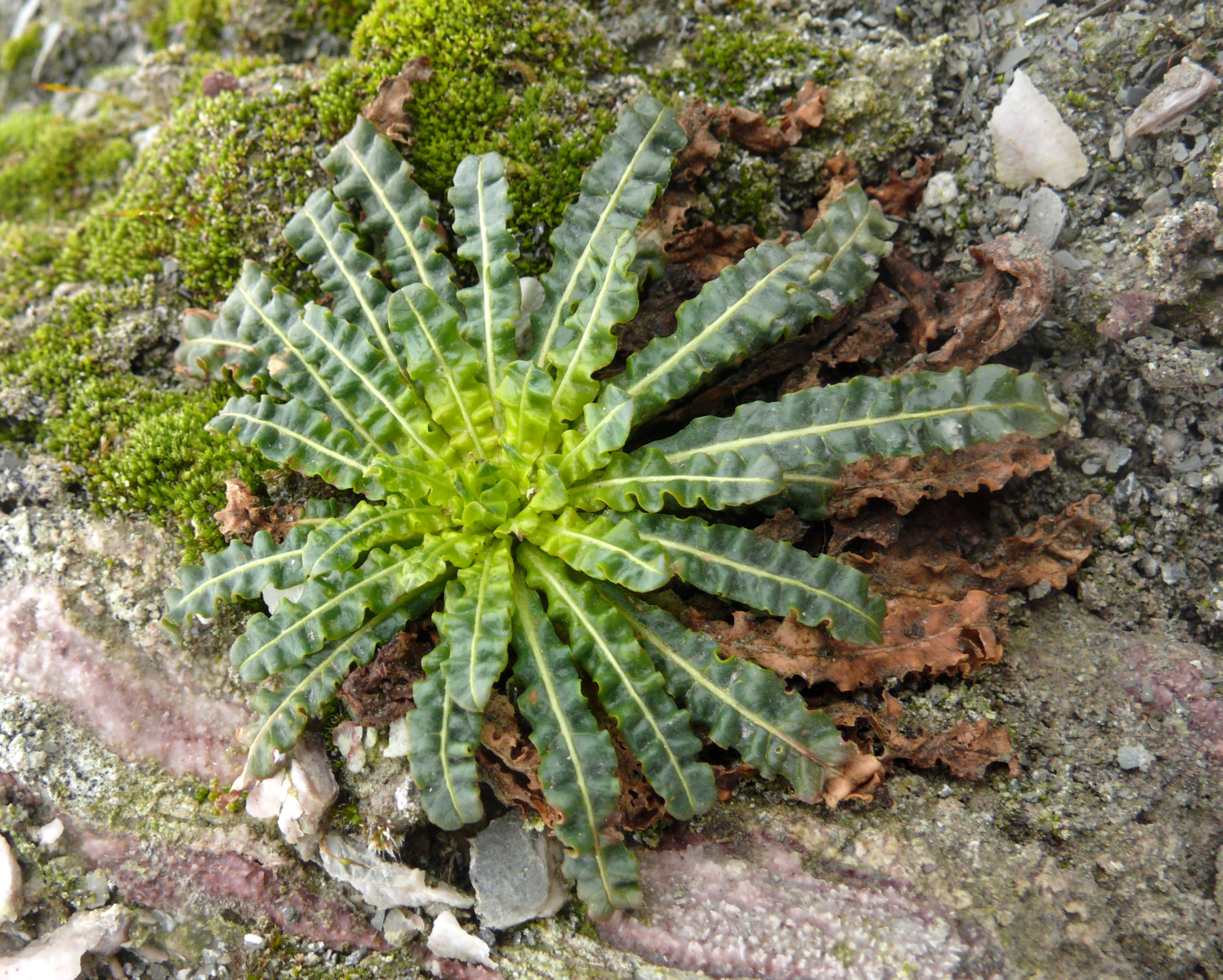 Reseda luteola, Hohenlohe, Deutschland